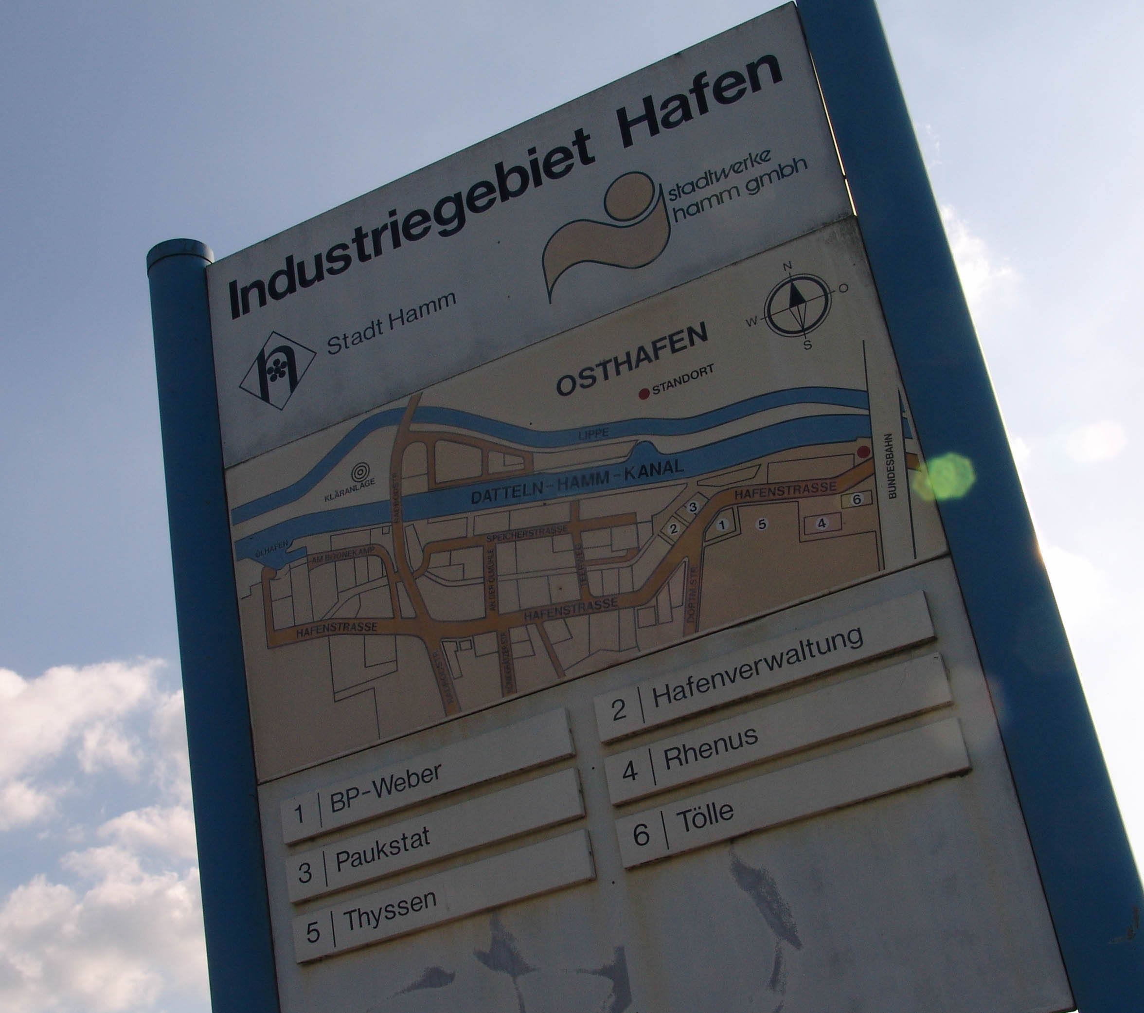 Lageplan und Hinweisschild am Stadthafen Hamm